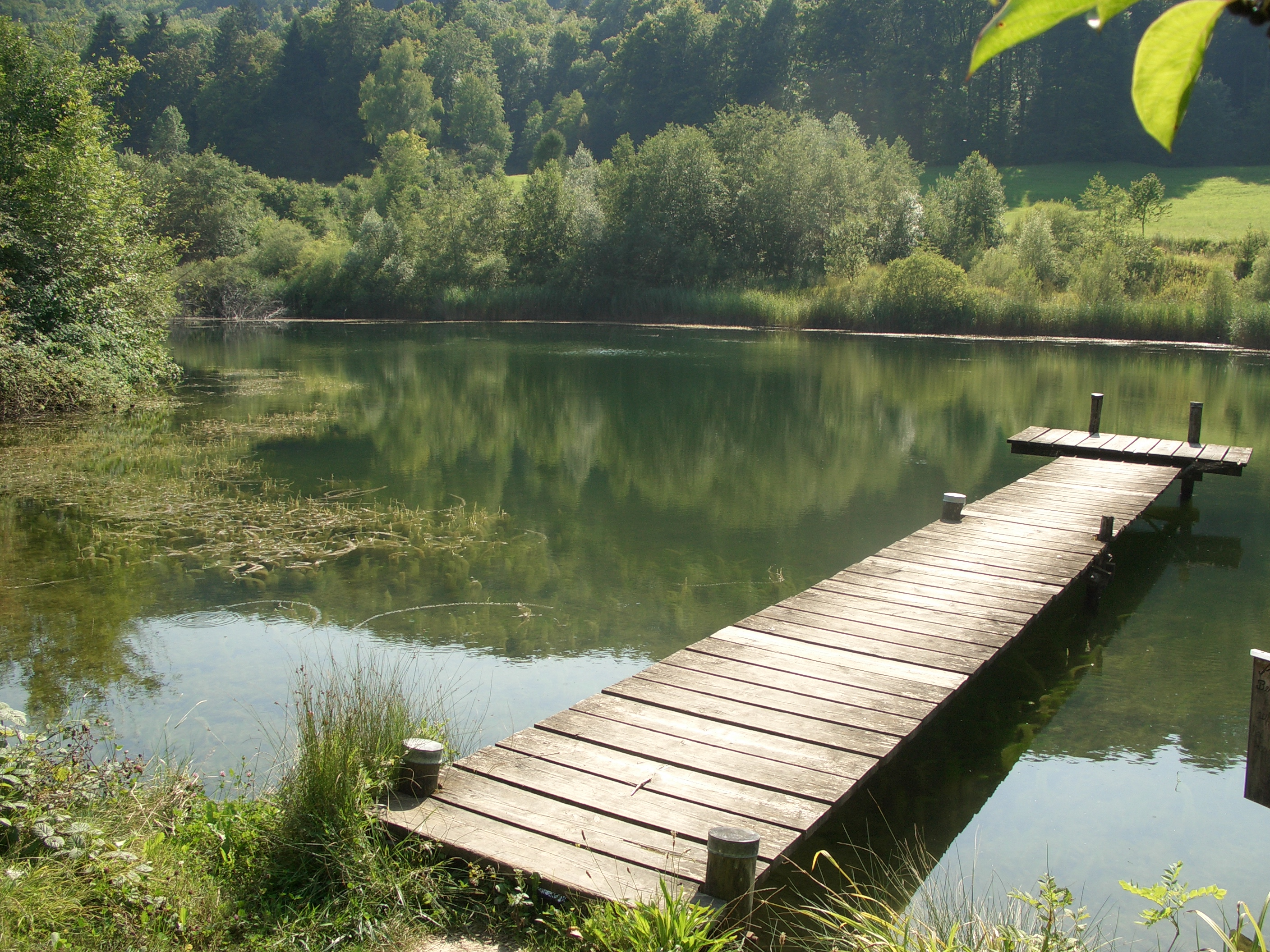 Naturschutzgebiet Dättnau: Dättnauerweiher, Teil des Weiher.